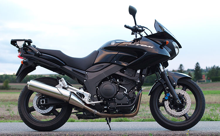 Yamaha TDM 900 A (RN18)